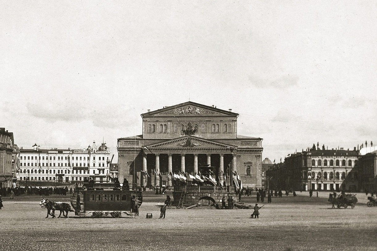 Москва. Театральная площадь в дни коронации Николая Романова. май 1896г. (справа вдали - магазин 'Мюр и Мерилиз' (старый)).